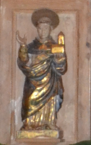 Figura de Santo del retablo de la Purísima de Santa María de Verdú.